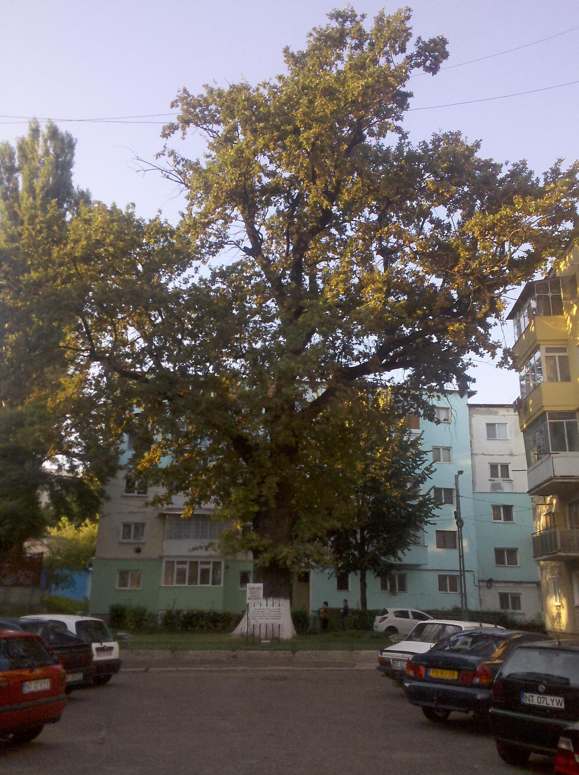 stejarul unirii din Roman